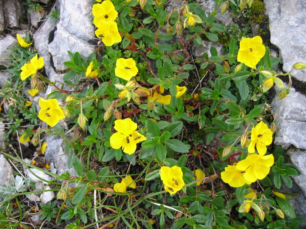 Großblütiges Sonnenröschen (Helianthemum nummularium subsp. glabrum, Syn. H. grandiflorum subsp. glabrum), Cistaceae - Großer Pyhrgas, Oberösterreich, Österreich/Austria